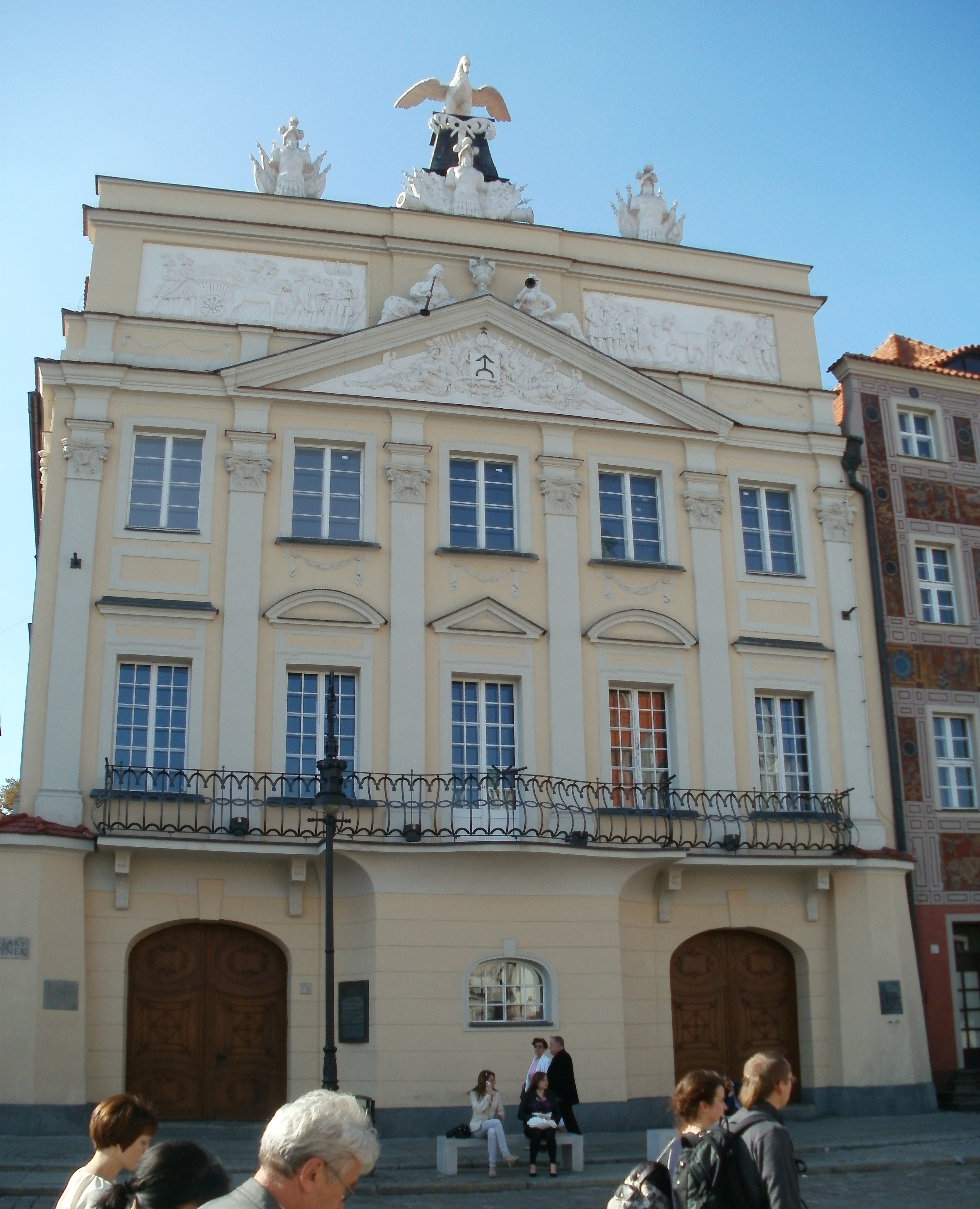 Poznań - Pałac Działyńskich